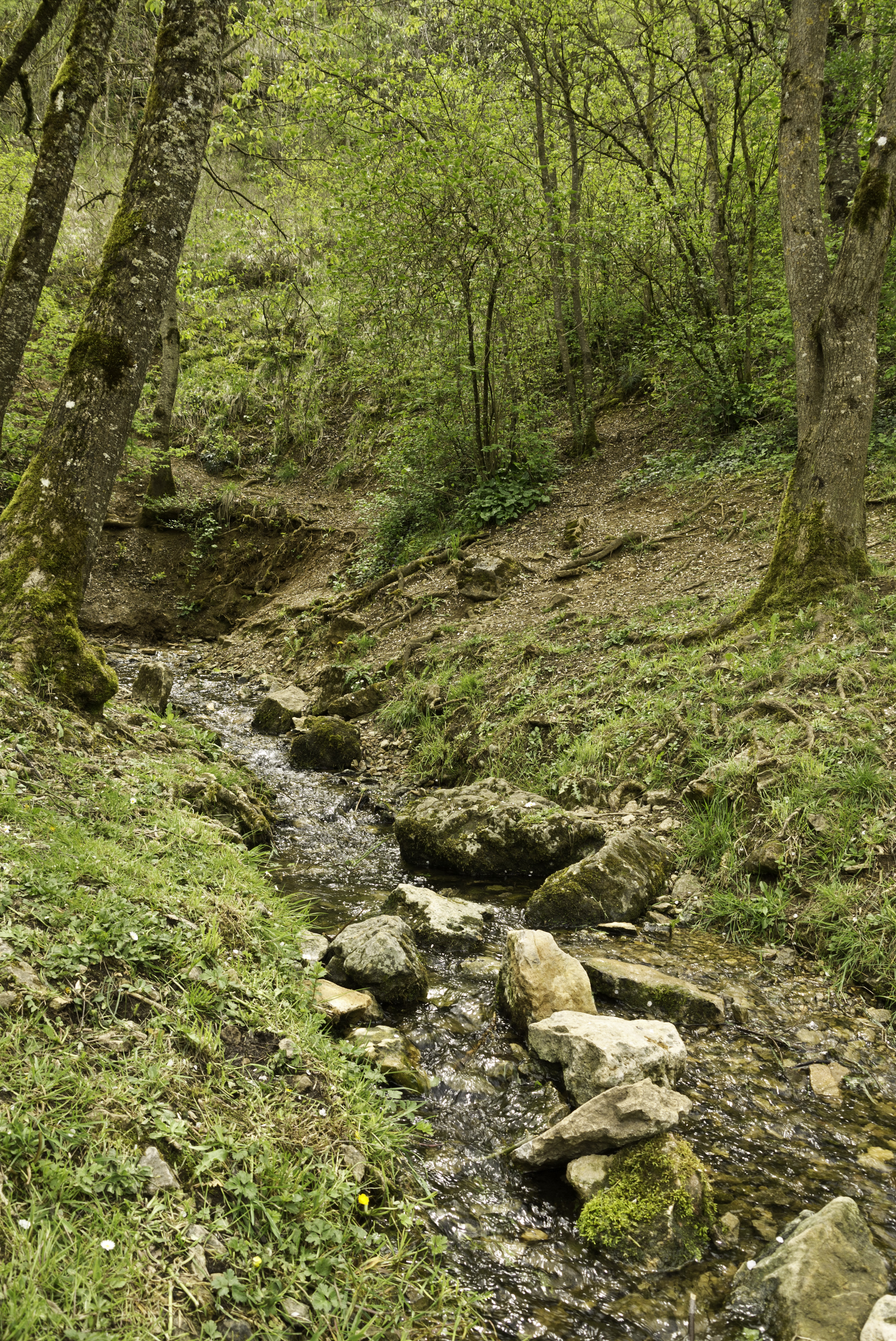 Sources de l'Aveyron, à Sévérac-le-Château (Aveyron, France).